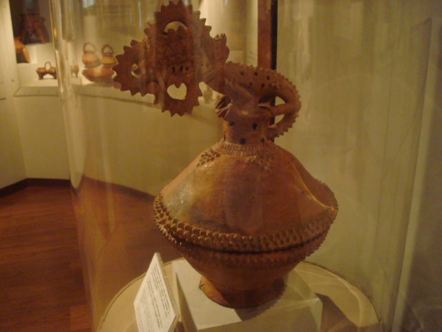 Incensario de cerámica monocroma proveniente de Nicoya. Museo del Jade, Costa Rica.